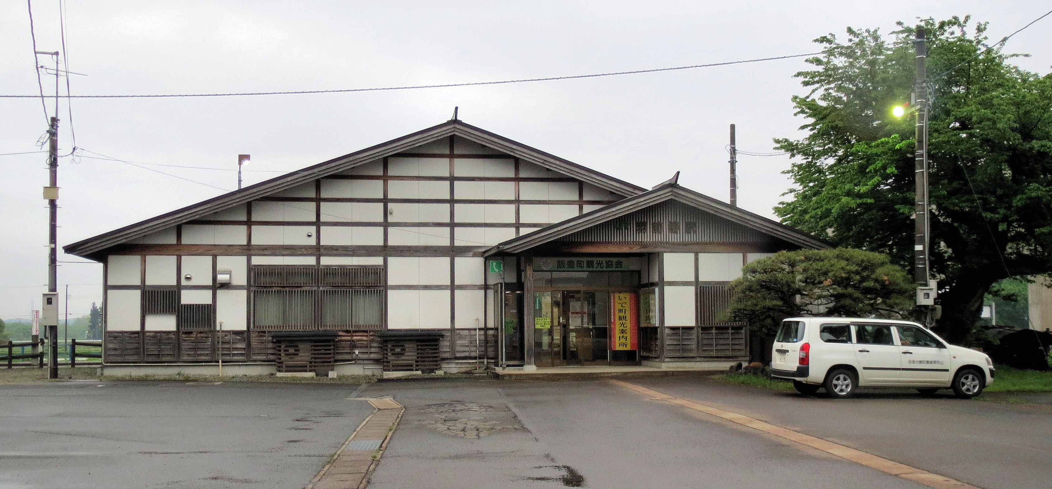 羽前椿駅(山形県西置賜郡飯豊町椿)